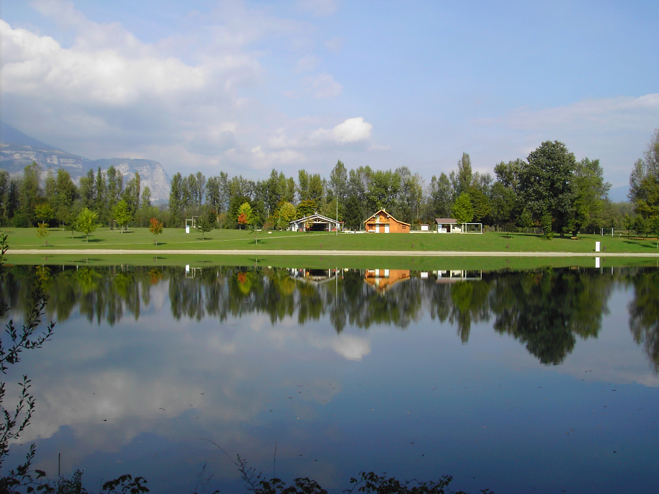 Base de loisirs du Bois Français, lac Taillefer - Saint Ismier, France